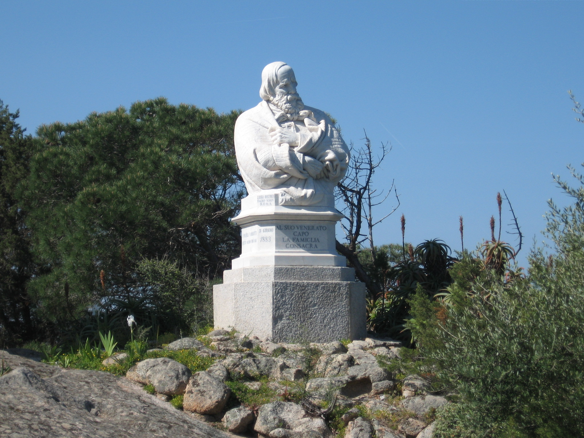 Busto a Giuseppe Garibaldi al Museo garibaldino di Caprera.